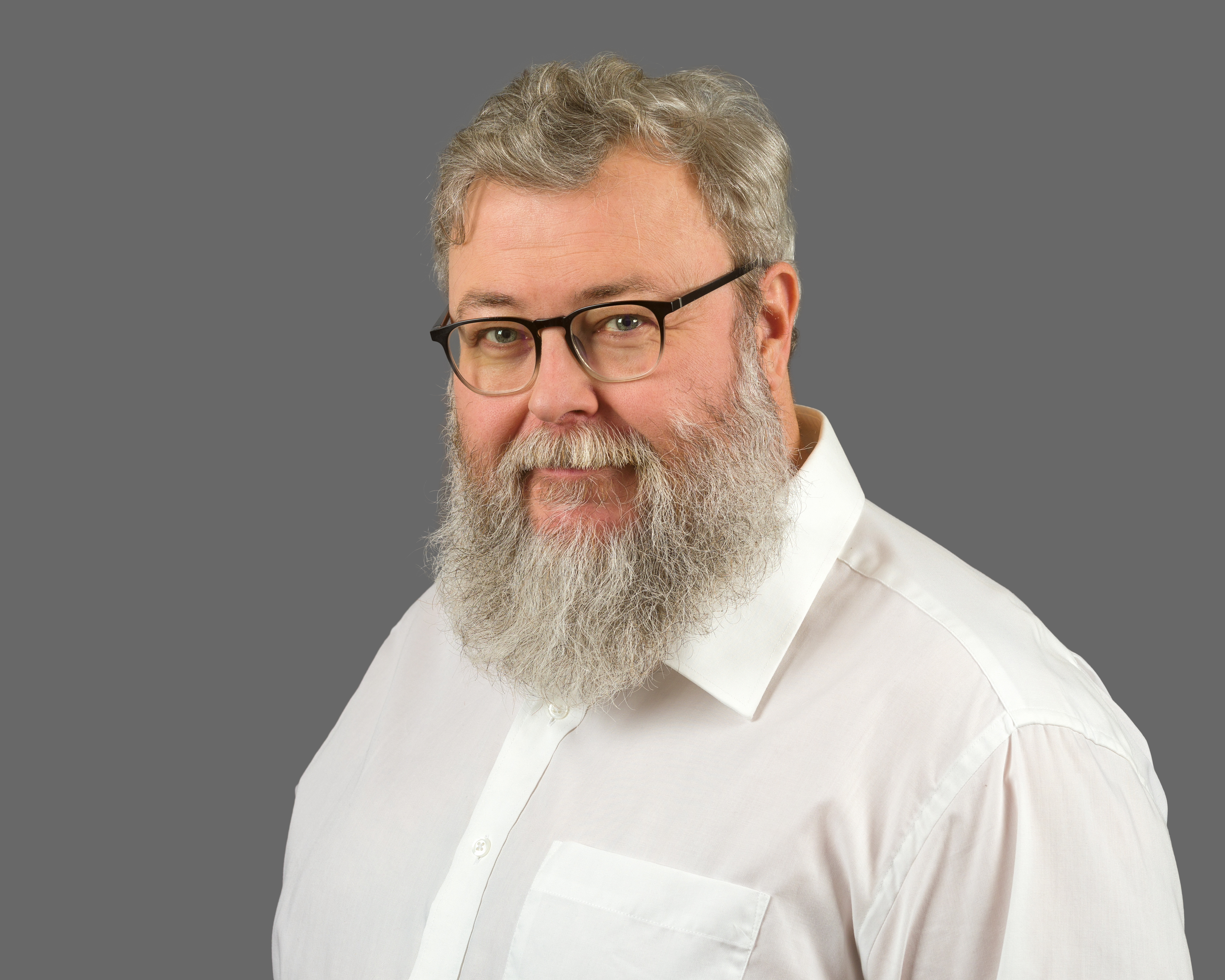 Český politik a libertarián Roman Kříž.